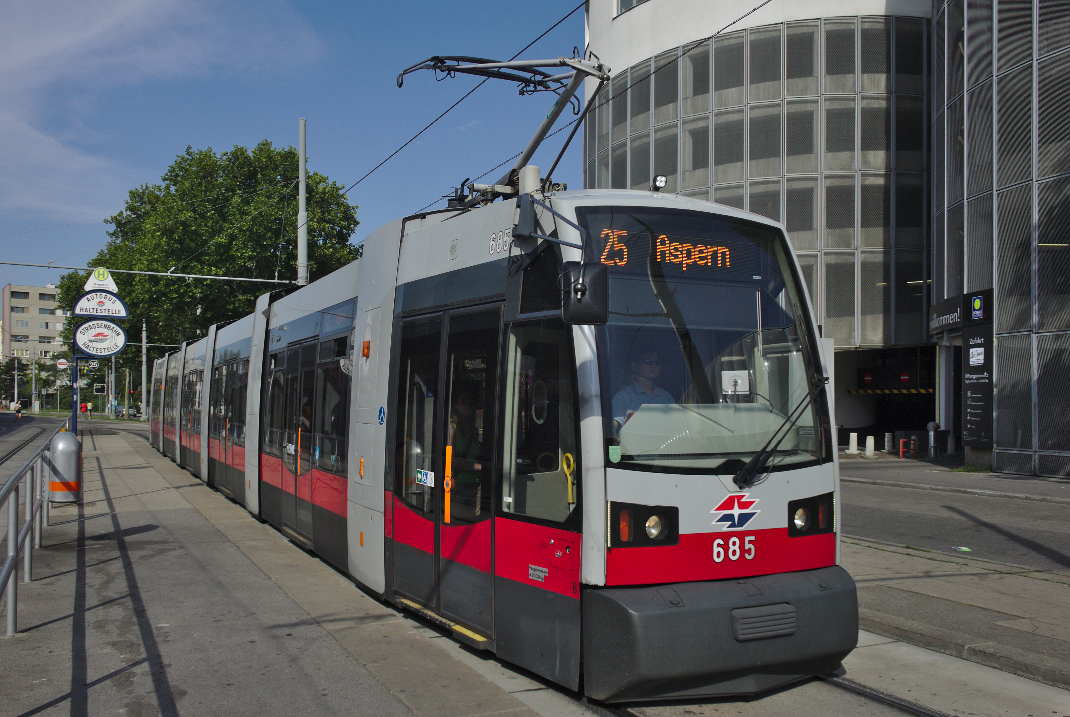 B 685 auf der Linie 25 Richtung Oberdorfstraße im hinteren Bereich der Haltestelle Kagran U, im Hintergrund rechts das Parkhaus 2 des Donau Zentrums